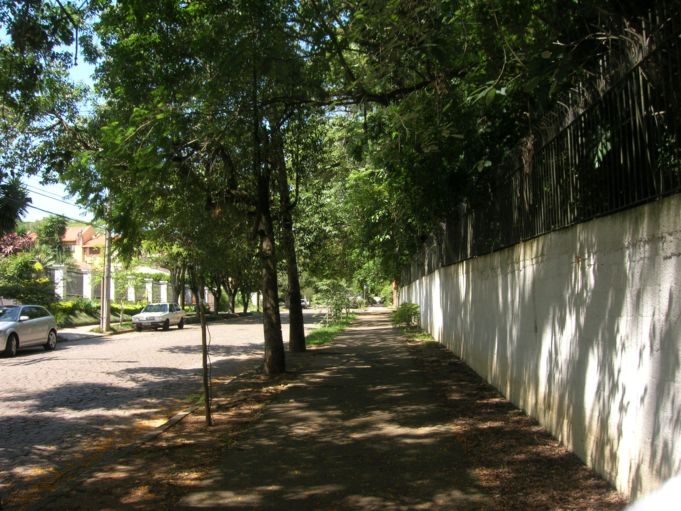 Fotografia de calçada da Avenida Luiz Manoel Gonzaga, no bairro Três Figueiras, da cidade brasileira de Porto Alegre.